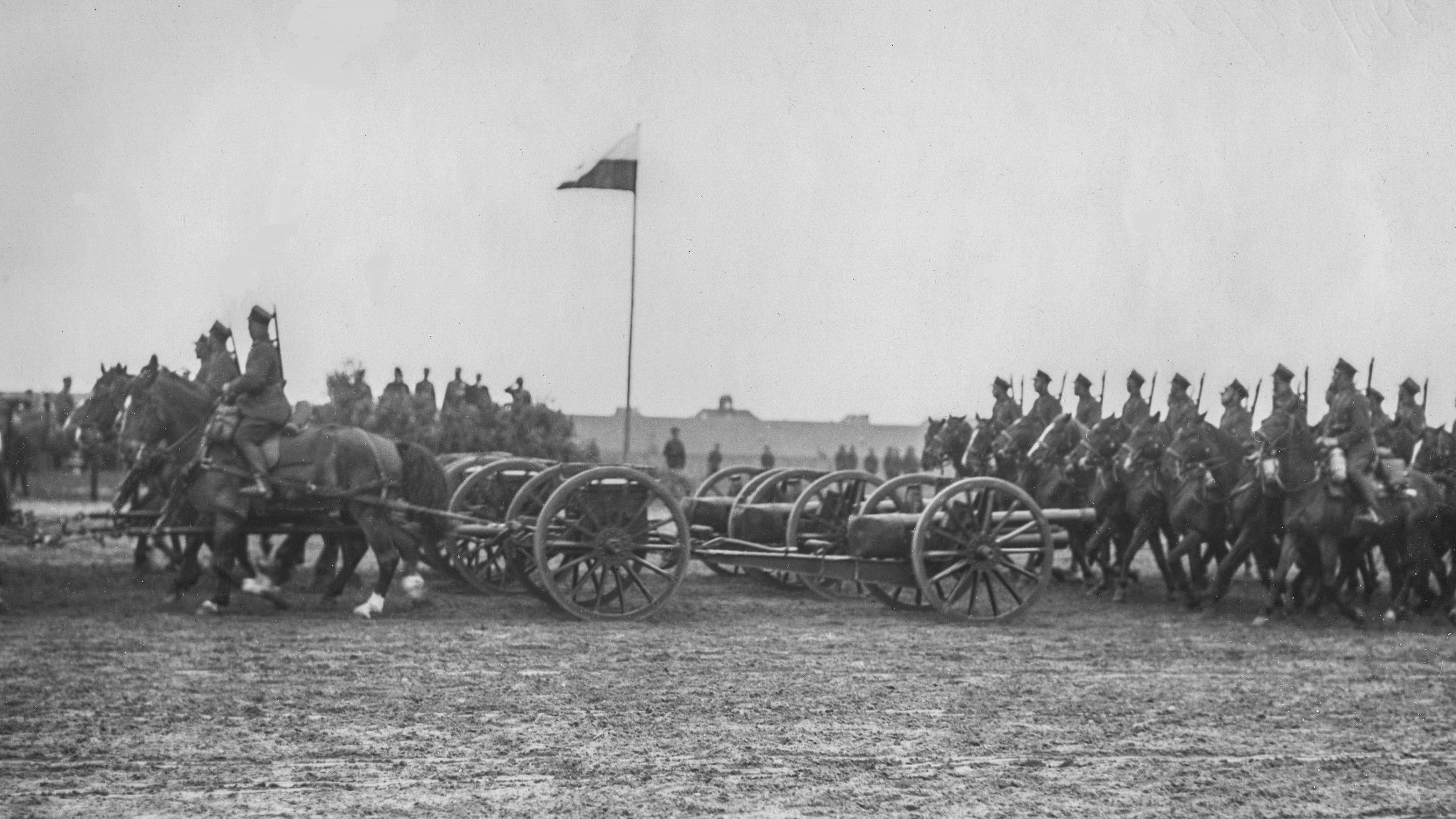 Święto 7 Dywizjonu Artylerii Konnej w Poznaniu 7 czerwca 1936. Fragment defilady dywizjonu przed dowódcą OK VII gen. Edmundem Knoll-Kownackim i wojewodą poznańskim Arturem Maruszewskim (na trybunie). Widoczna bateria złożona z armat polowych kal. 75 mm wz. 02/26. Koncern Ilustrowany Kurier Codzienny - Archiwum Ilustracji. Sygnatura: 1-W-1480